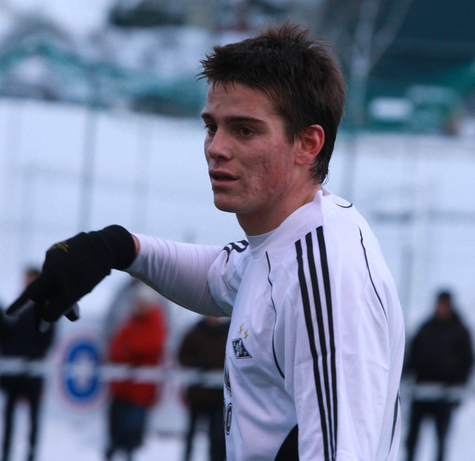 Simen Wangberg fotballspiller RBK